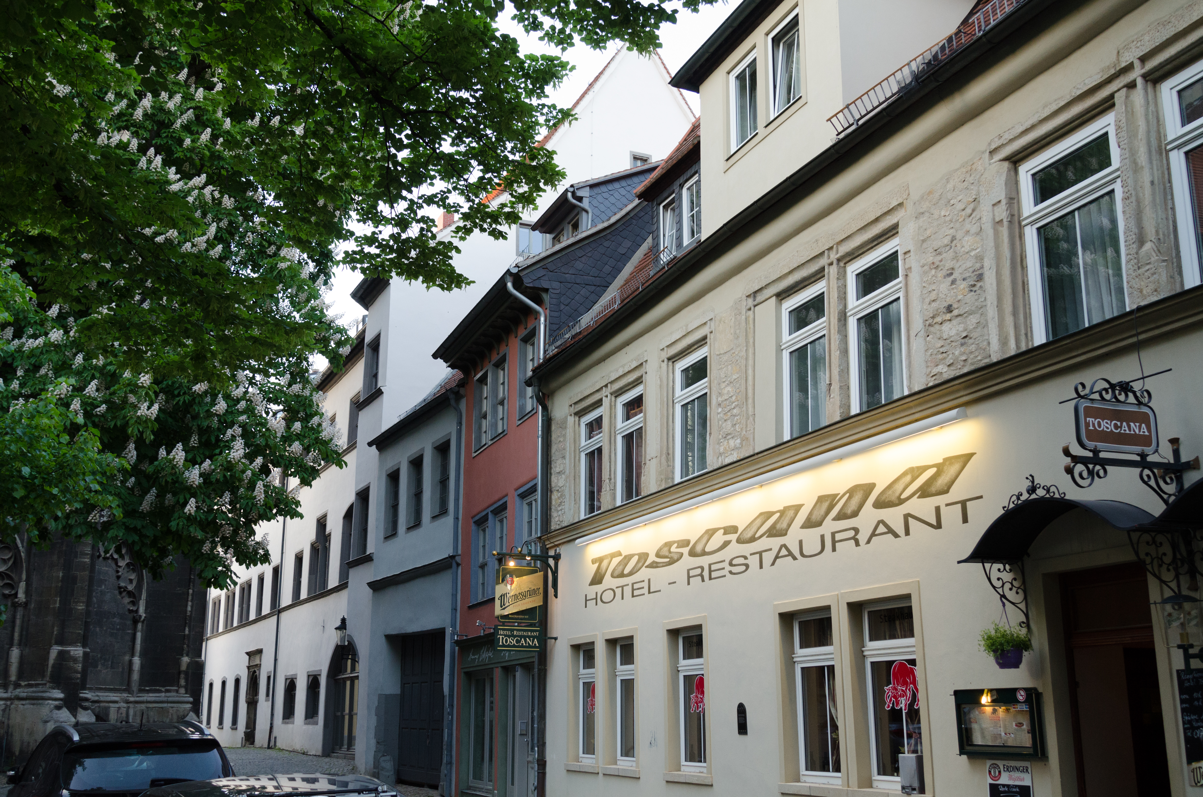 Naumburg, Topfmarkt 17, 16